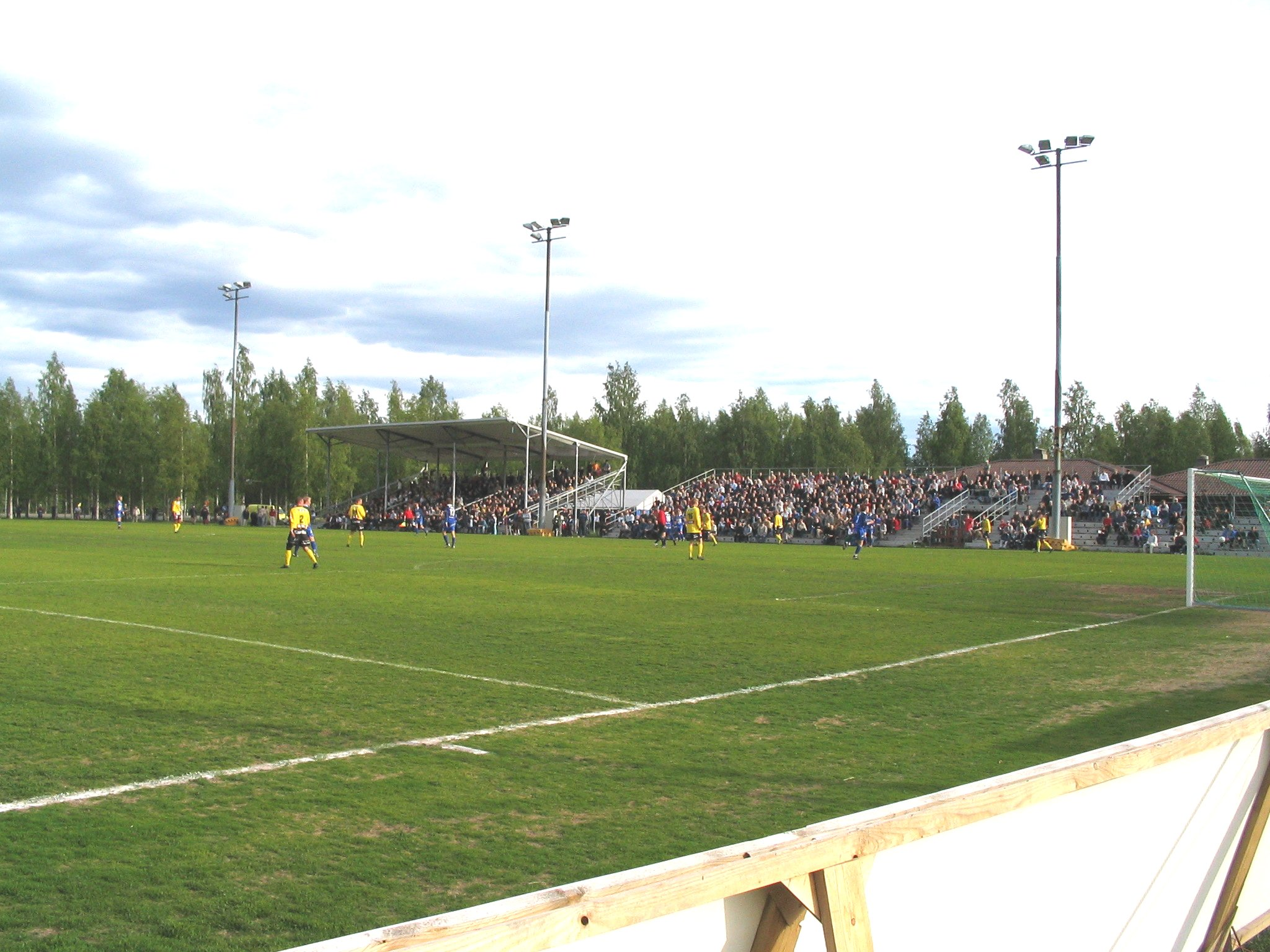 ACO-KuPS 10.6.2004, Castrenin kenttä